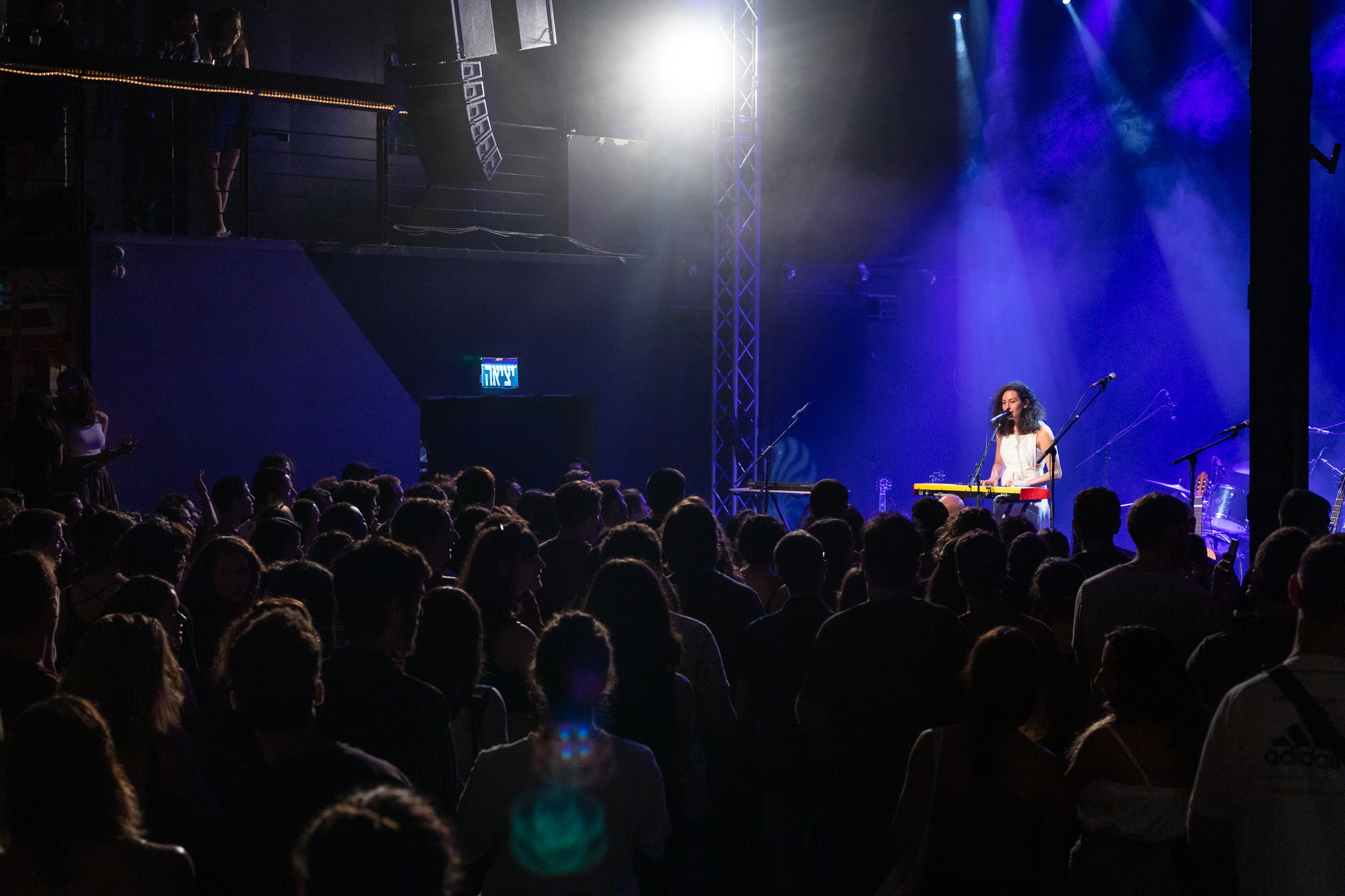 דניאל רובין בהופעה בבסקולה